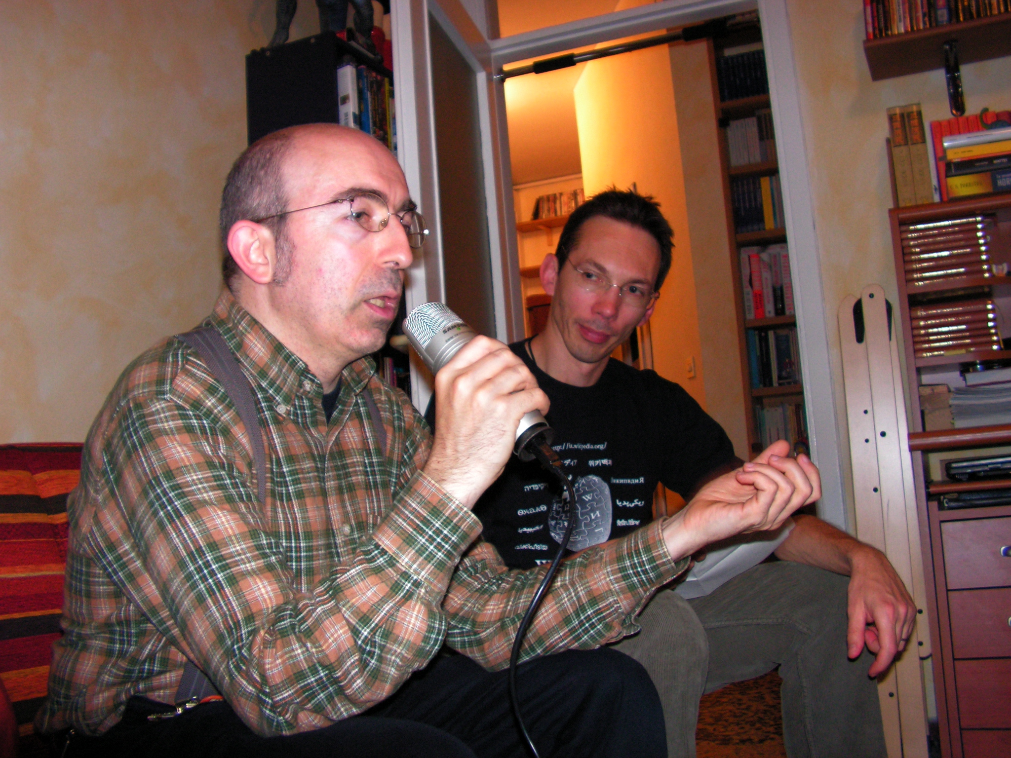 Wiki@Home: Intervista con Antonio Serra (colori ritoccati da Marcok)